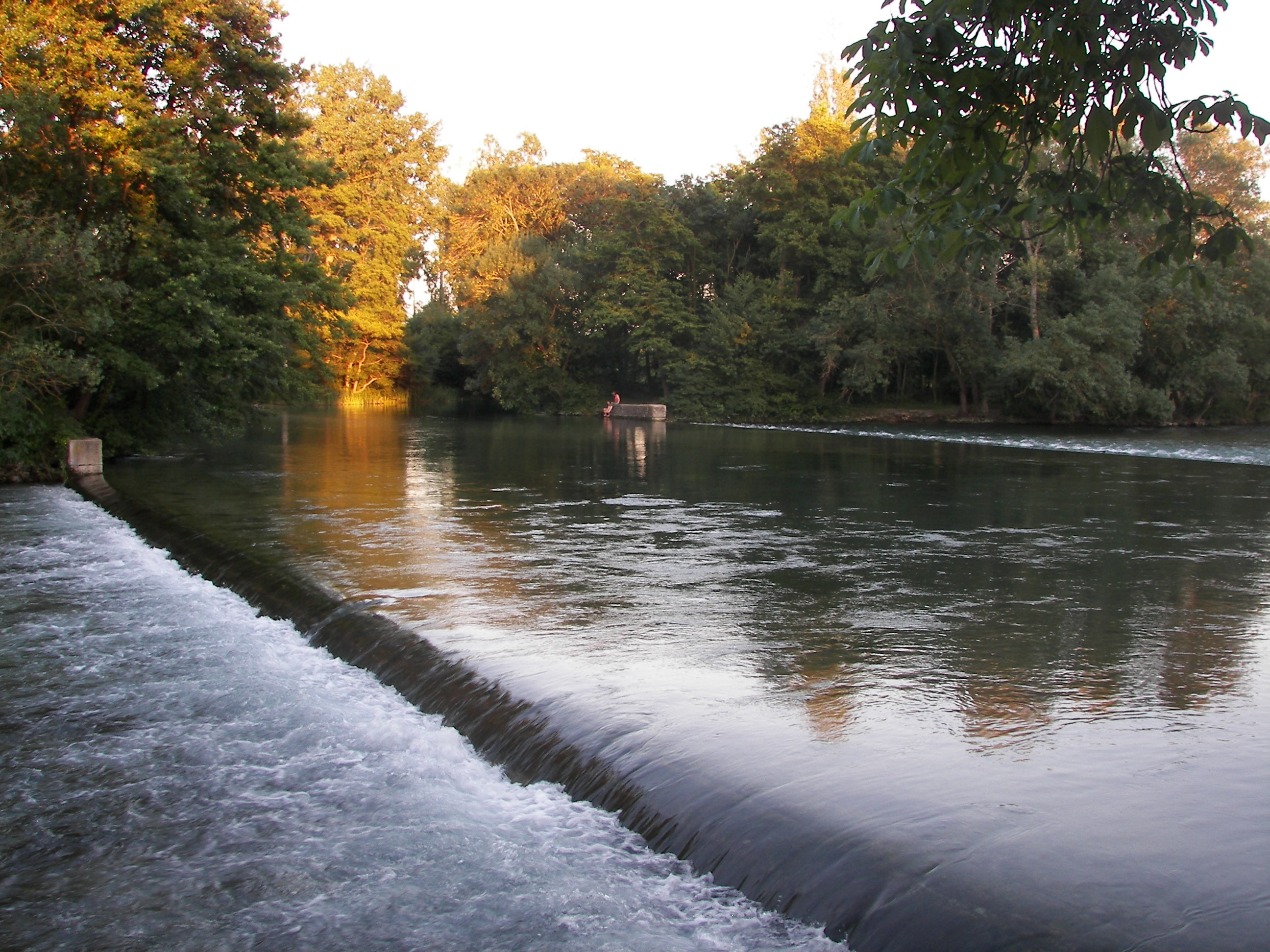 Photo prise par moi même le 21 Juin 2008 à L'Isle sur Sorgue (Vaucluse) au Partage des Eaux (de la Sorgue)